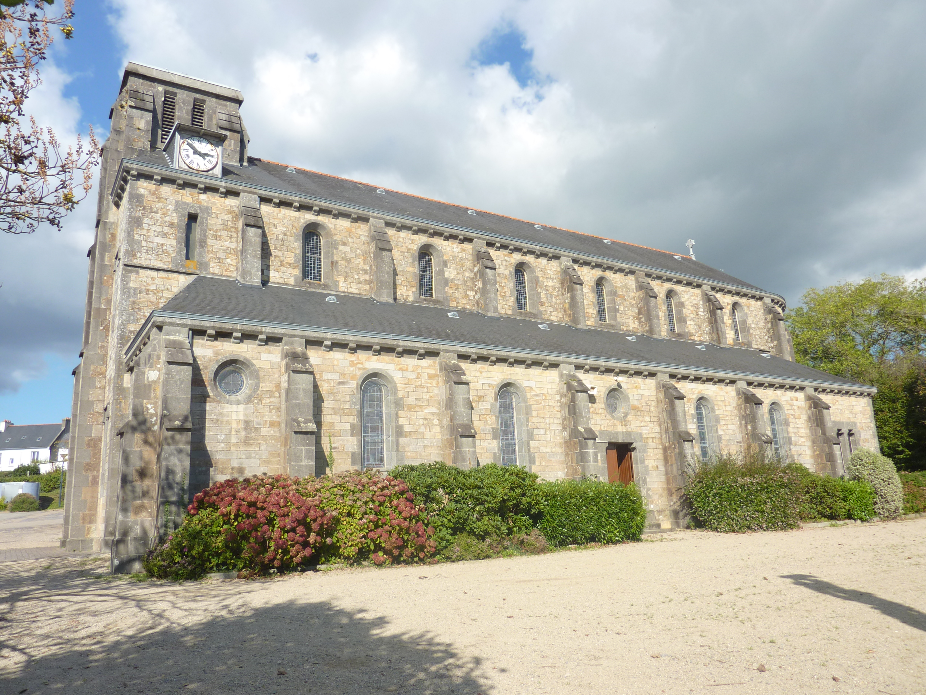 Loperhet : l'église paroissiale vue de côté